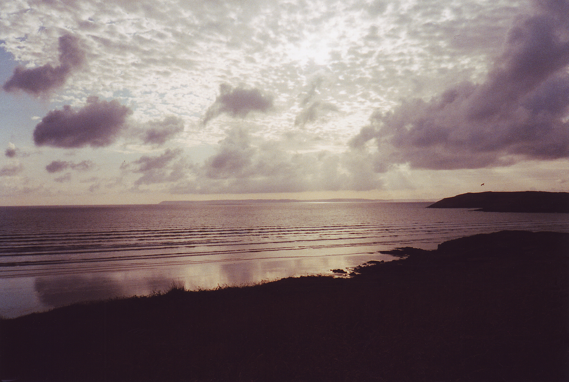 Baie de Douarnenez, vue sur la cap de la Chèvre au fond de l'image.